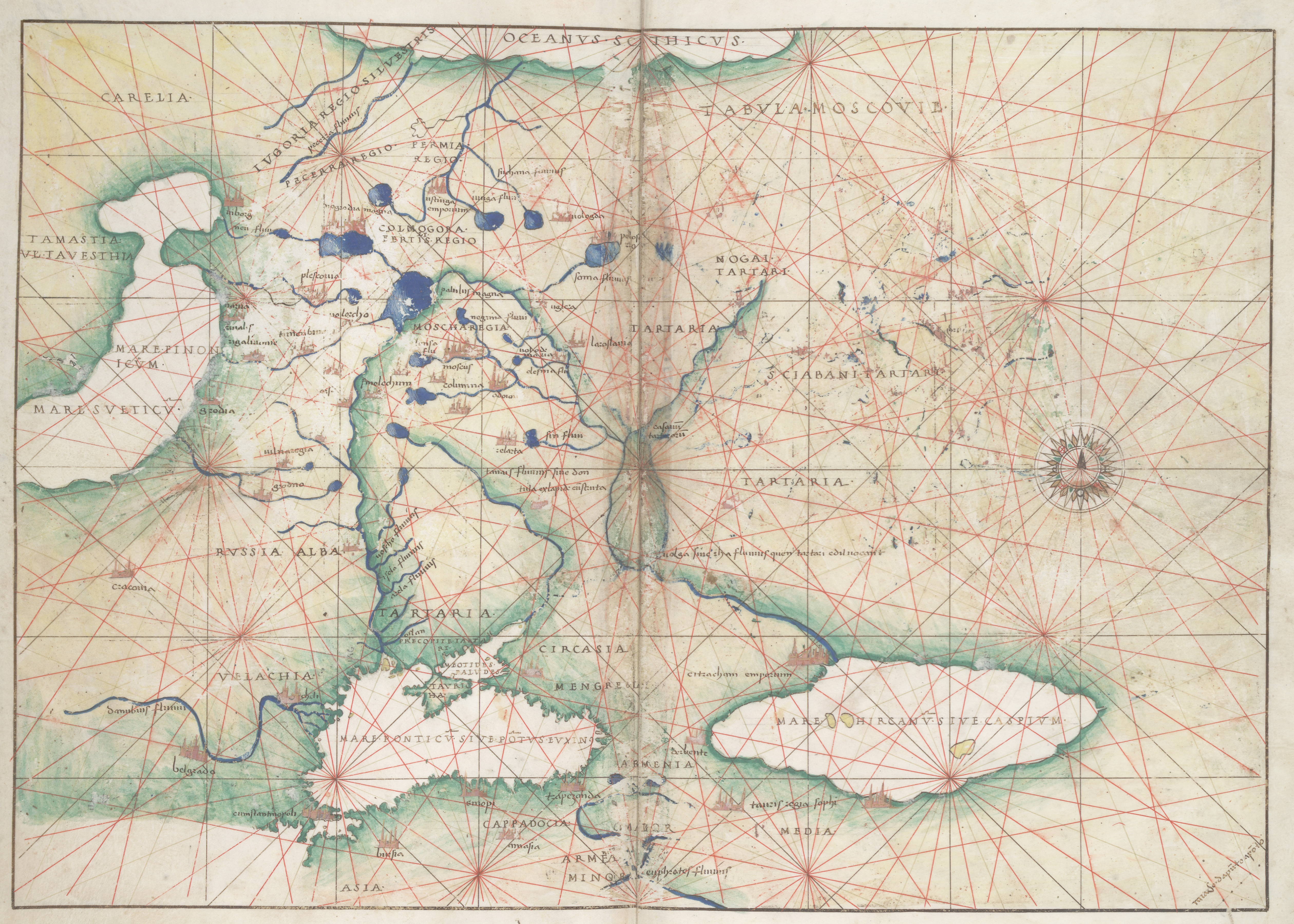 Портолан чорного і азовського морів. Східної європи. Агнес Батіста 1550 рік.